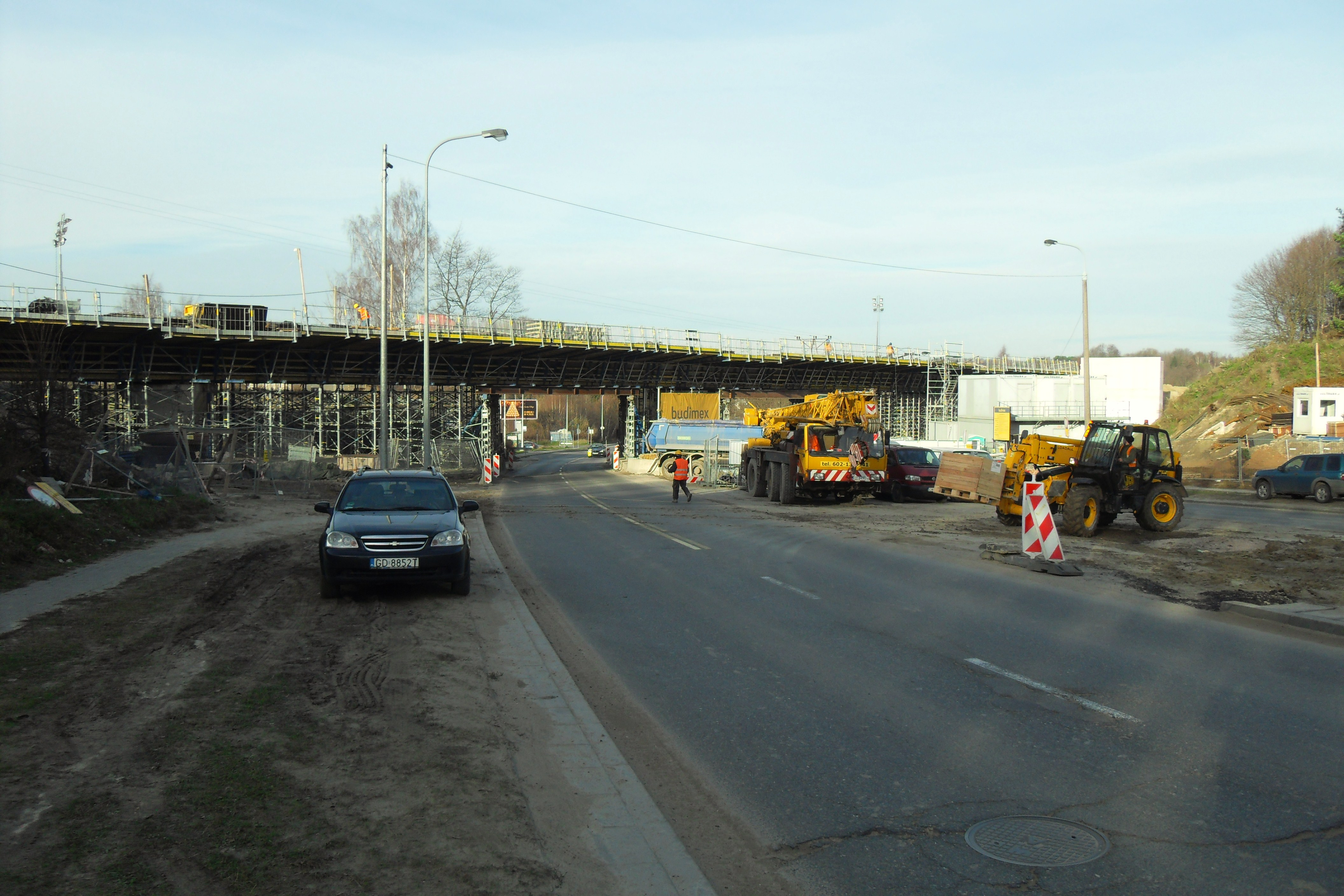 Gdańsk Brętowo, ul. Rakoczego. Pomorska Kolej Metropolitalna w budowie.